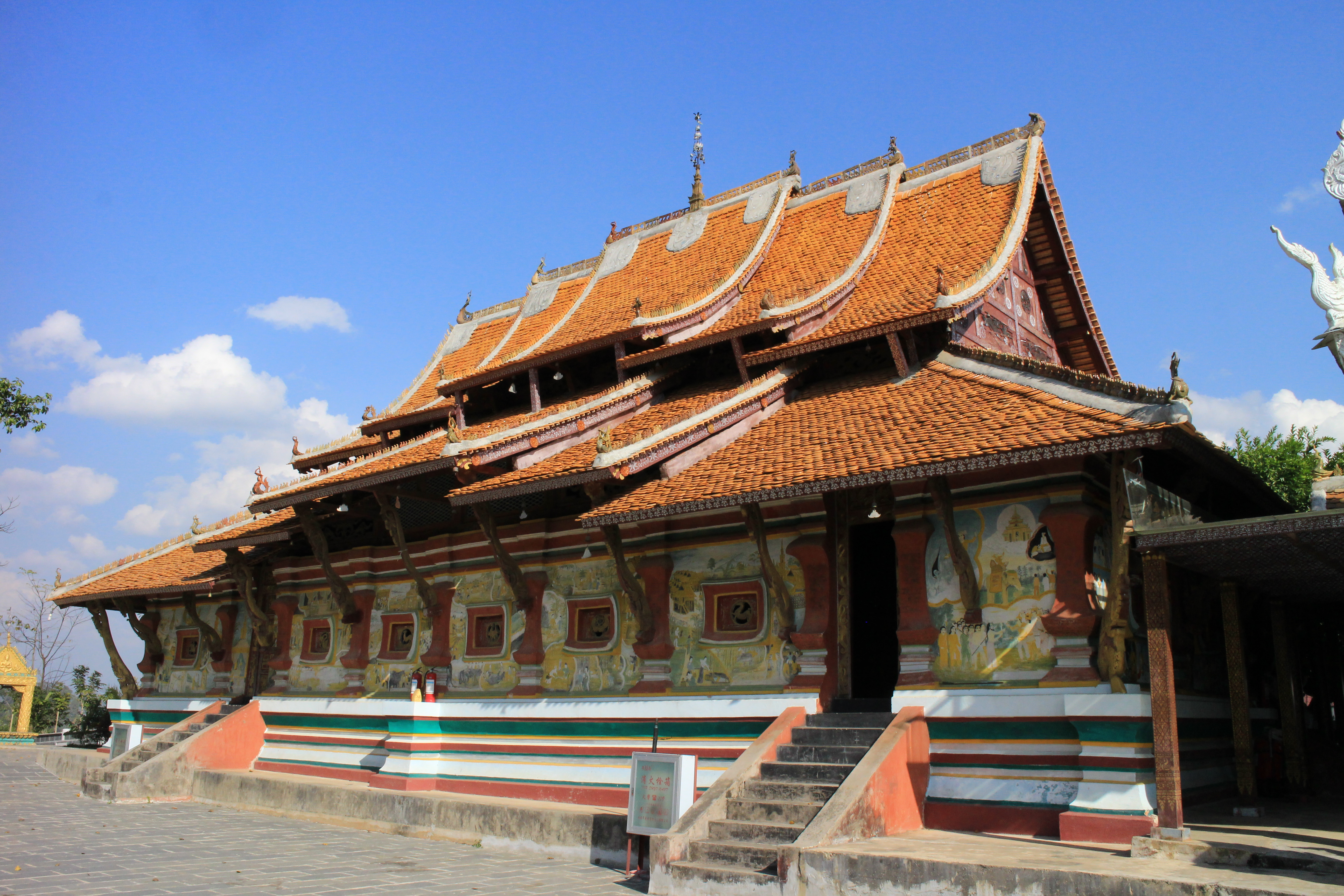 曼短佛寺佛殿